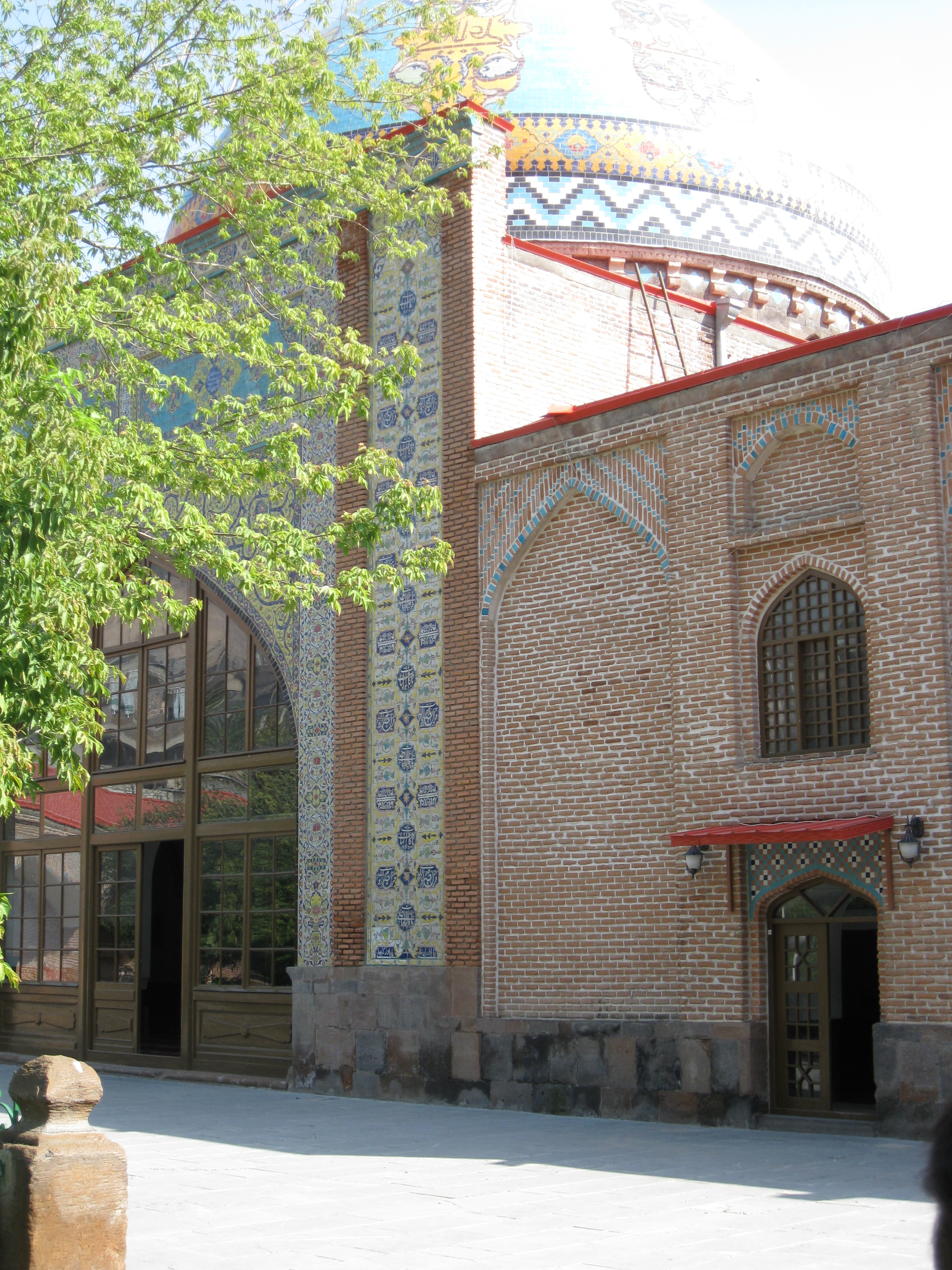 Blaue Moschee, Jerevan 6/150